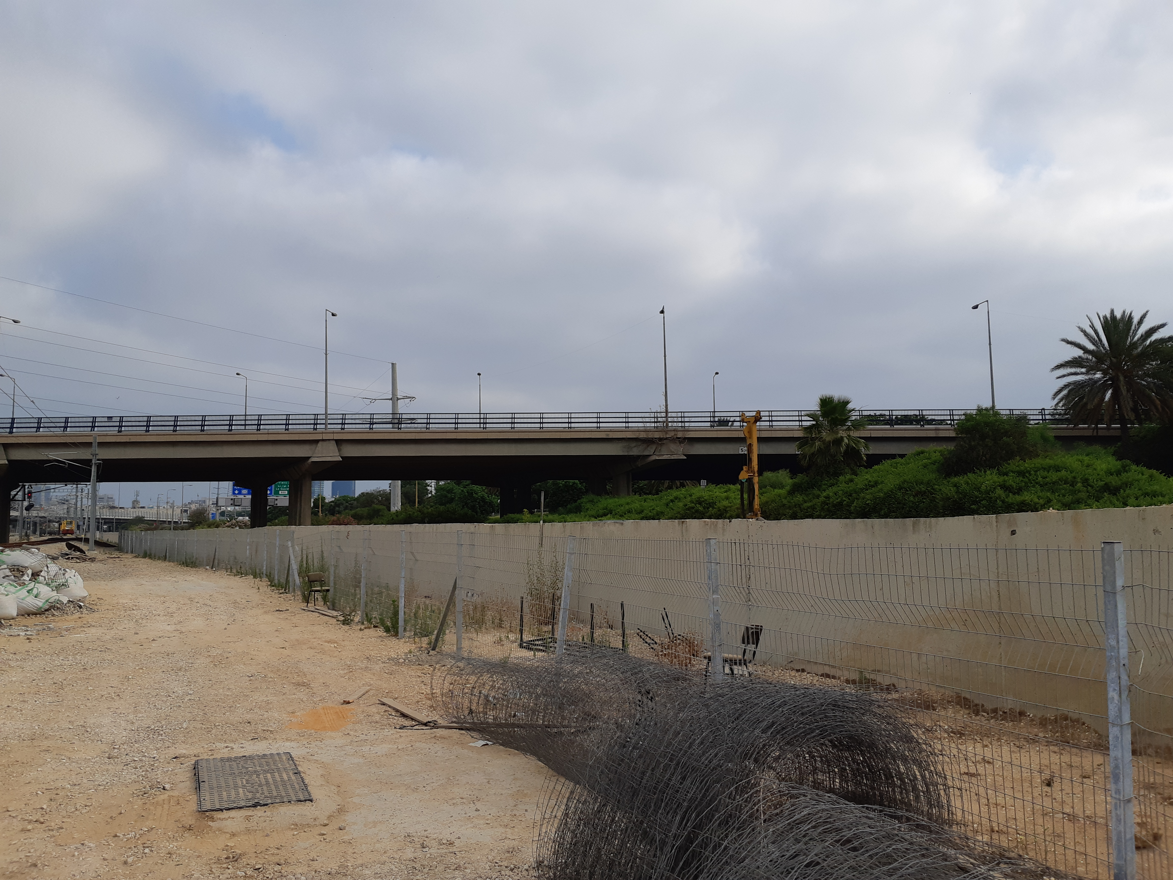 גשר קיבוץ גלויות מעל כביש 1 צד מזרחי (כביש 461)